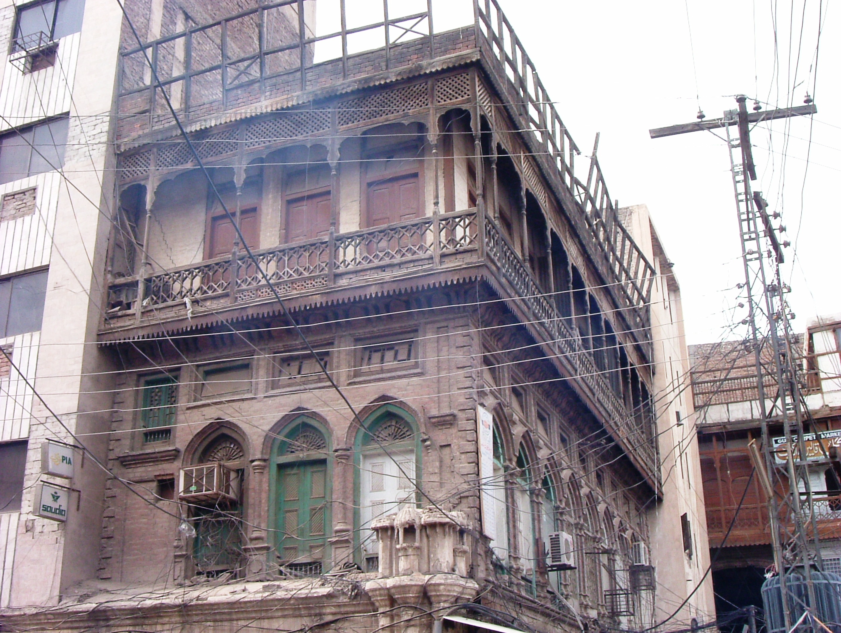 Qissa Khwani Bazaar, Peshawar, Pakistan